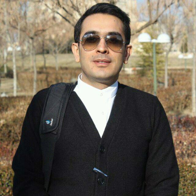 پرتره ی شیرزاد پیک حرفه، فیلسوف ایرانی در اواخر سال ۱۳۹۵ خورشیدی و ۲۰۱۷ میلادی